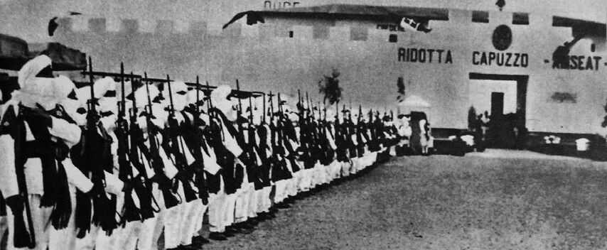 Militari libici del Regio Corpo delle truppe coloniali schierati davanti Forte Capuzzo